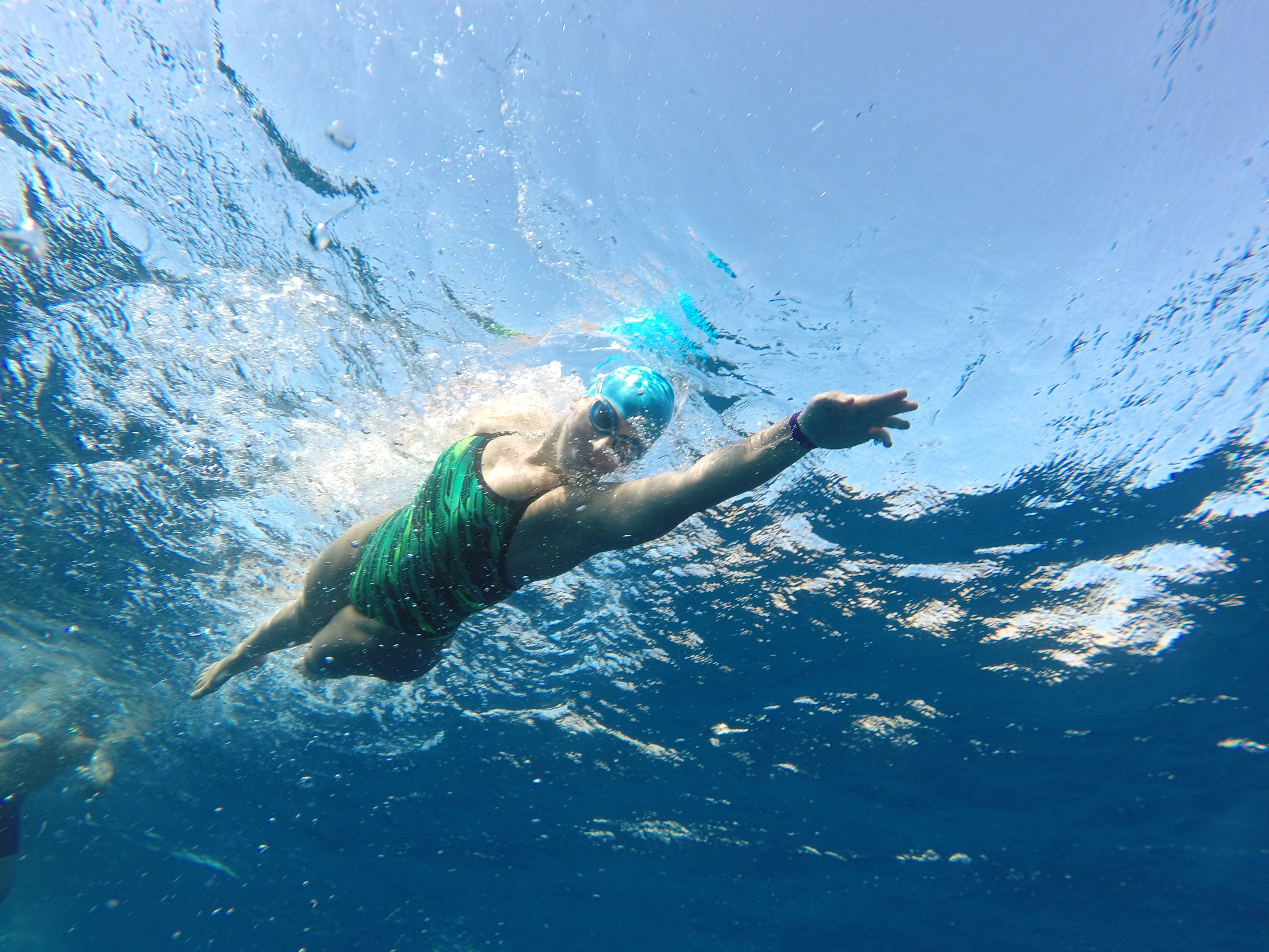 אבישג טורק שוחה מבחנה אימון אילת של עולם המים